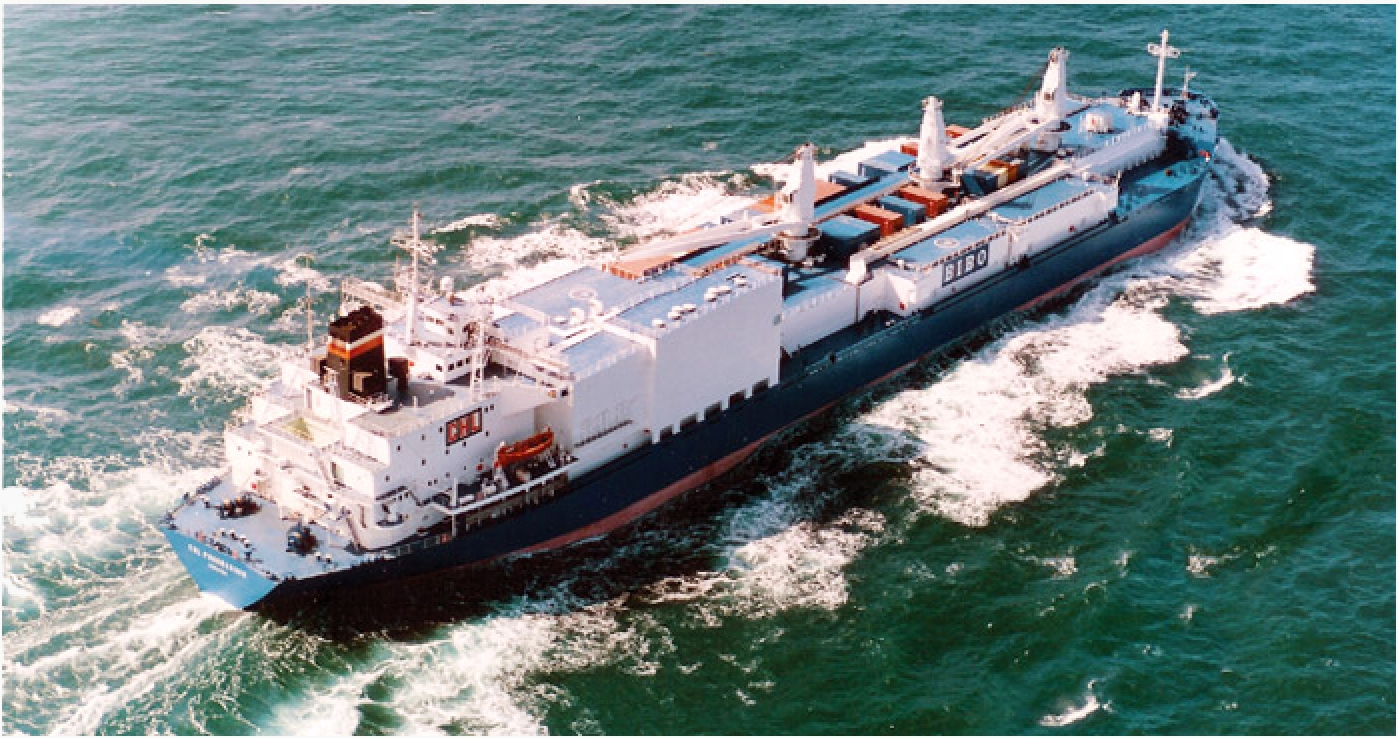 מערכת אונית צובר מתמחה ביבו